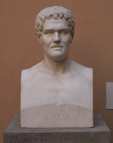 Nombre: Manuel Tolsá Fotografió: Carlos Martínez Blando (2005) Otra información: Busto esculpido por Martín Soriano (1853). Se encuentra en el Museo Nacional de San Carlos en la Ciudad de México. Tomado con una cámara Canon Digital Rebel XT. 1/160 ASA 400